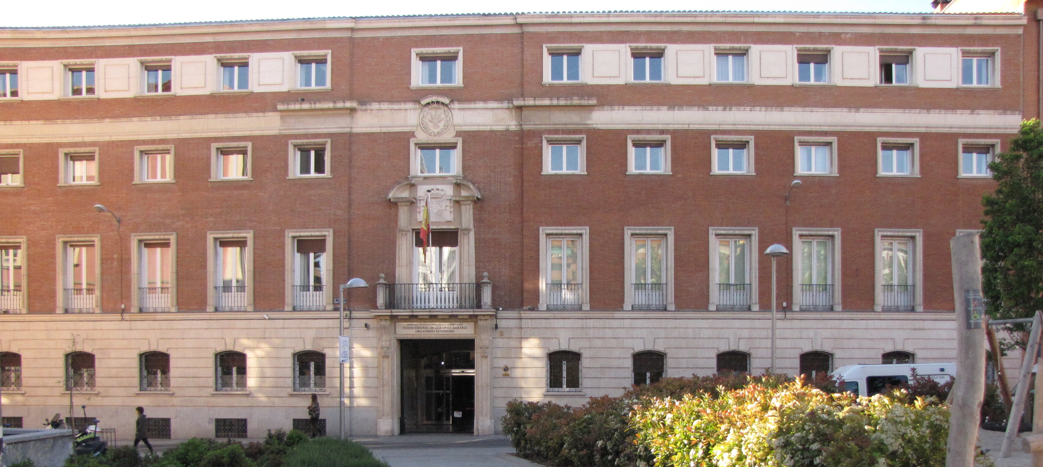 Fotografía de la fachada del palacio de Veragua.